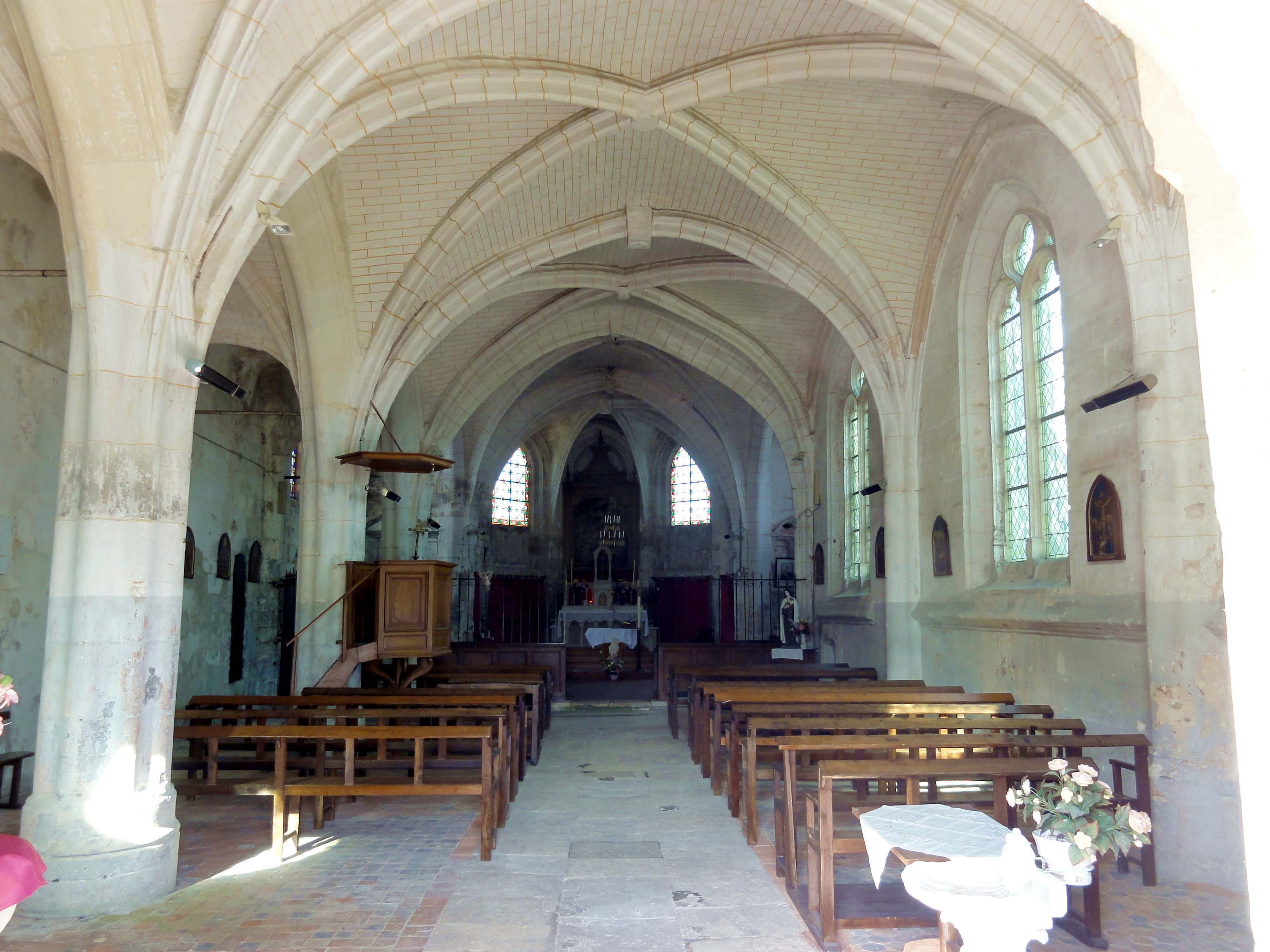 Intérieur de l'église Saint-Wandrille de Rivecourt (voir titre).